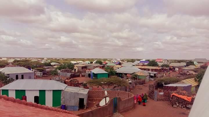 Soomaaliga: Maabaan2 waxaa qaaday oday guriceel